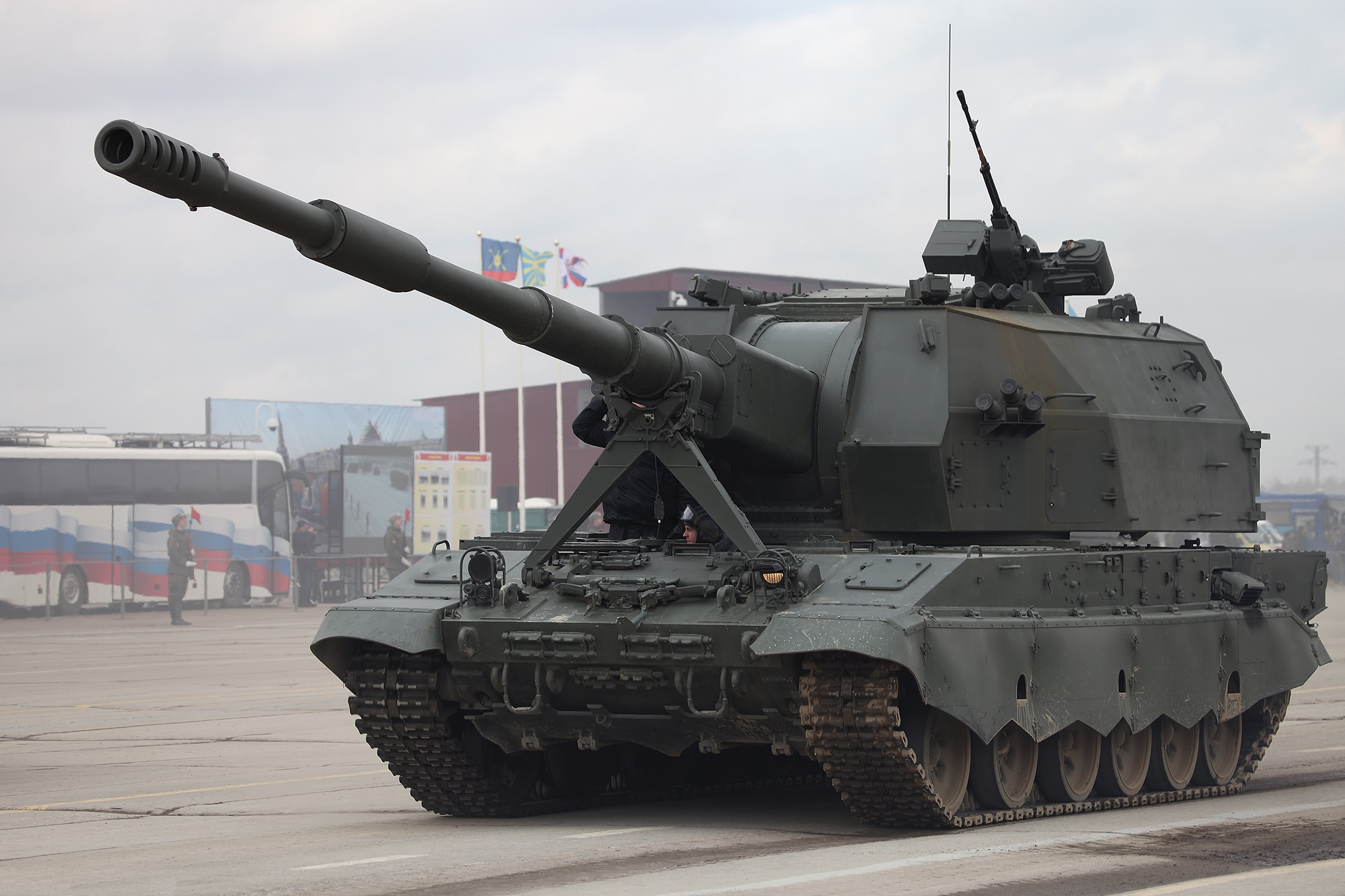 САУ 2С35 Коалиция-СВ (Self-propelled gun 2S35 Koalitsiya-SV)